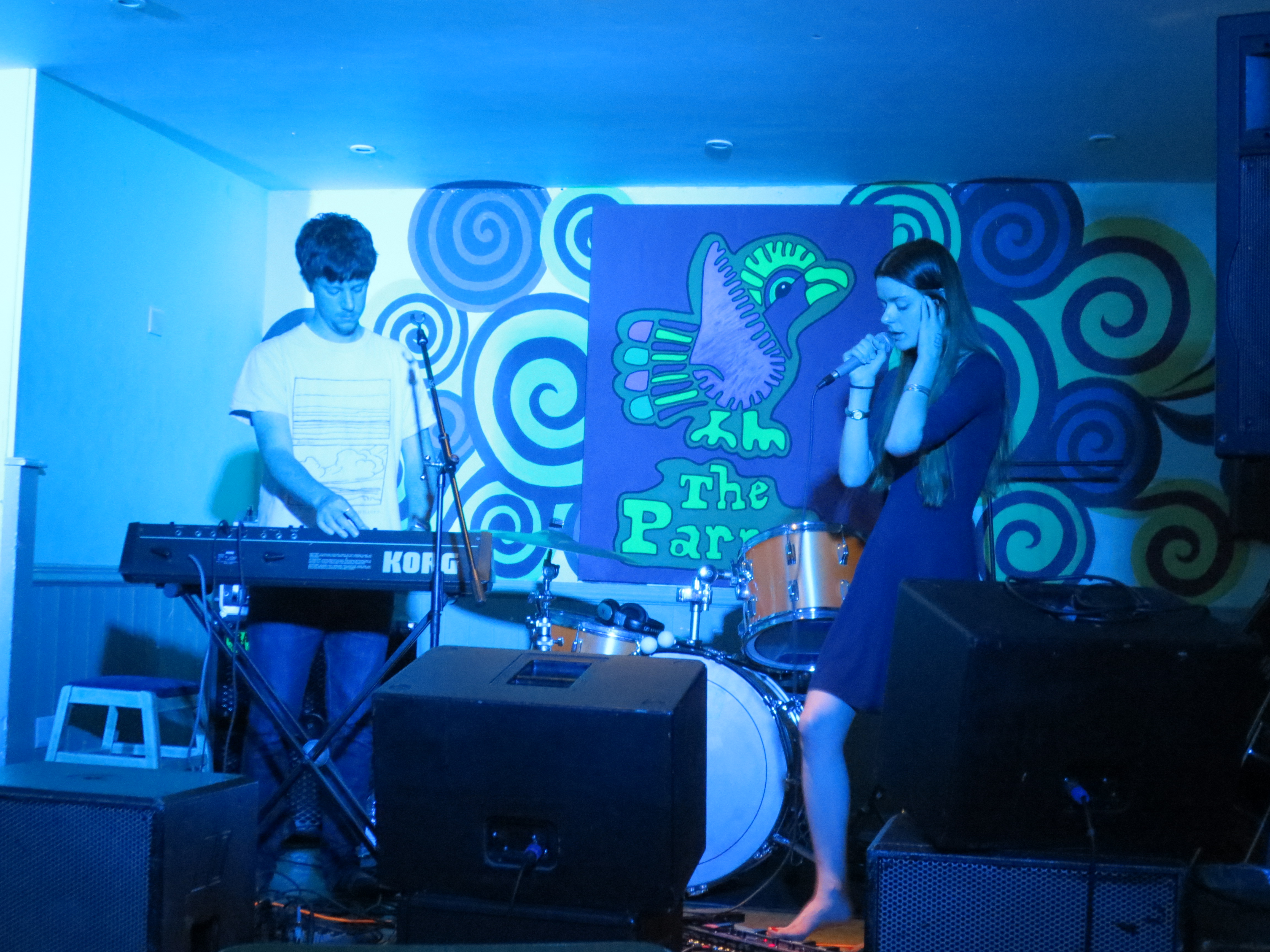 Trwbador yn chwarae Tafarn Parrot, Caerfyrddin